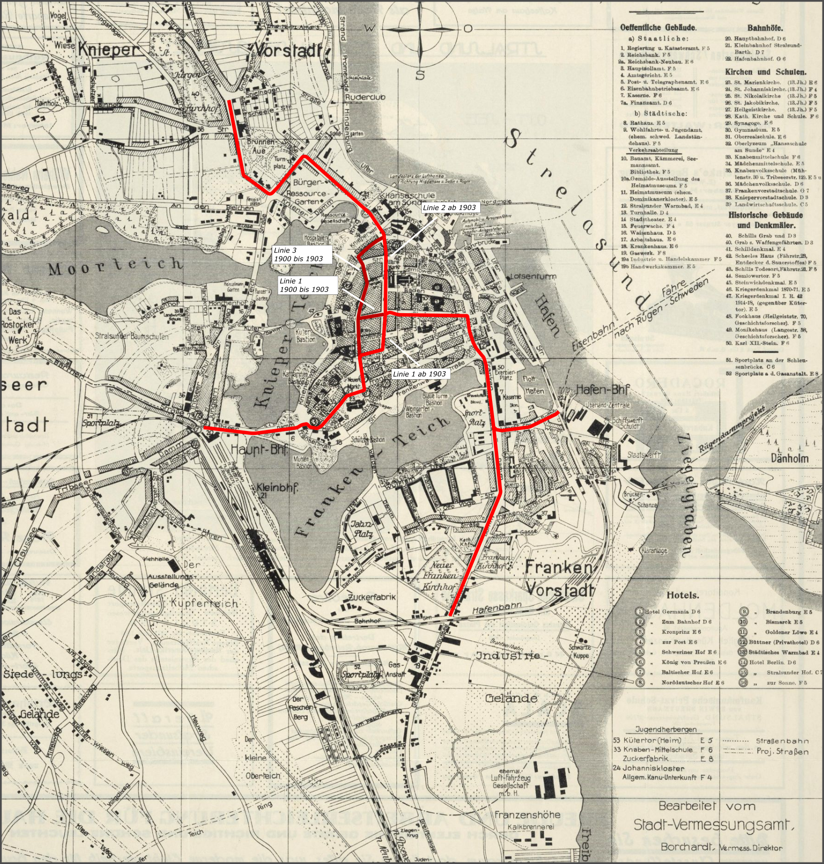 Auschnitt aus einem Stadtplan aus den 1930er-Jahren. Verlauf der Straßenbahnstrecken farblich herovrgehoben